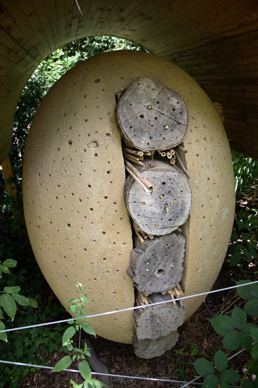 Vortex Garten Darmstadt